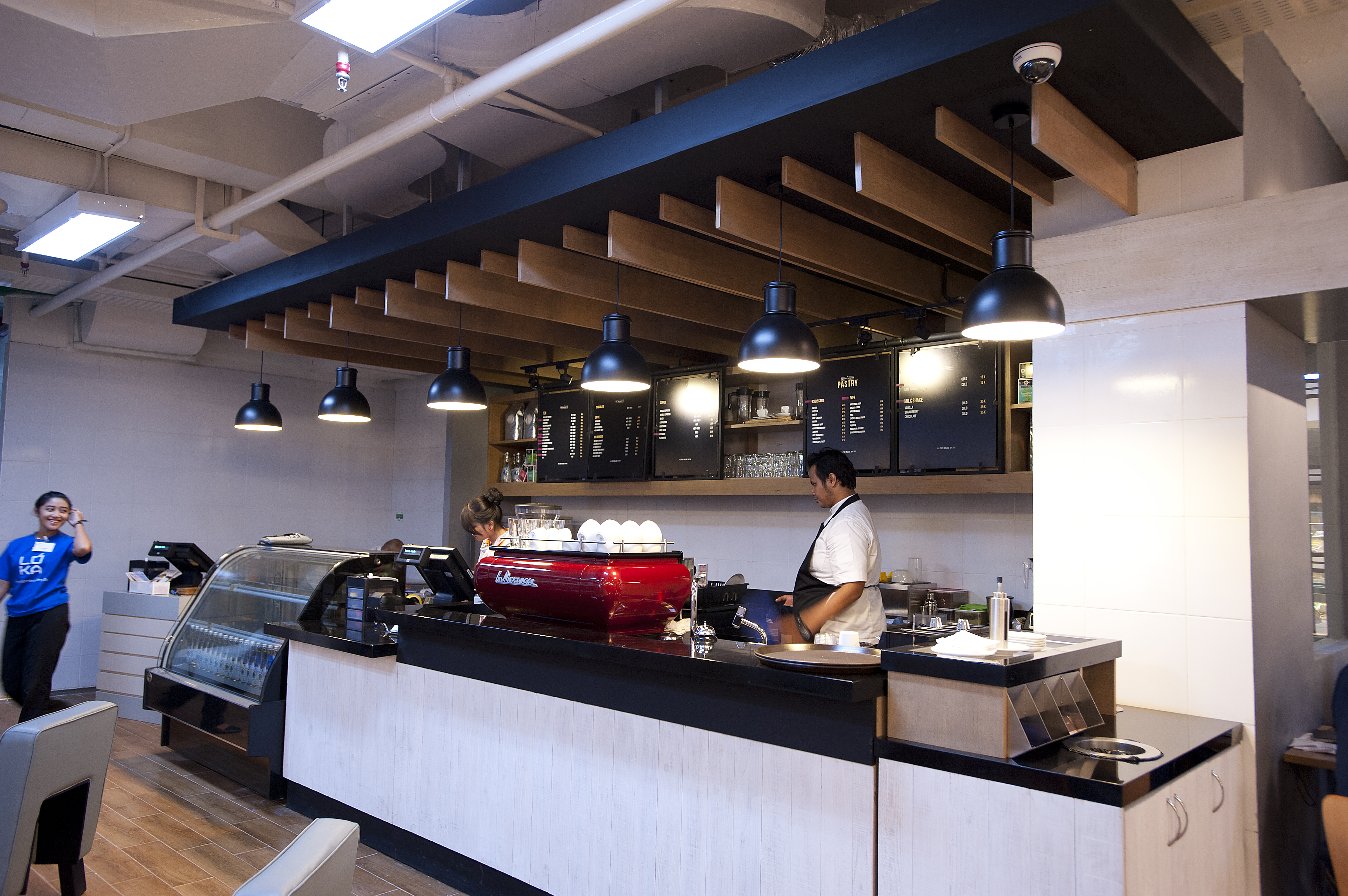 The Philocoffee